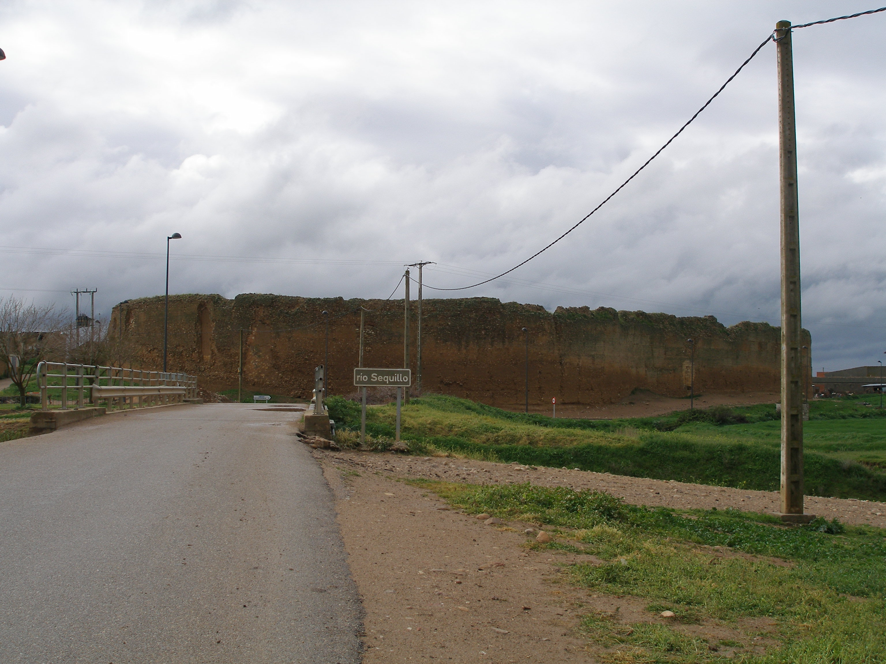 Vista del Castillo de San Pedro de Latarce, foto propia.